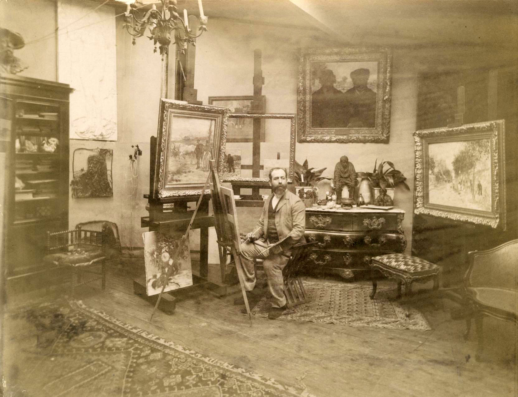 Jean-François Raffaëlli dans son atelier